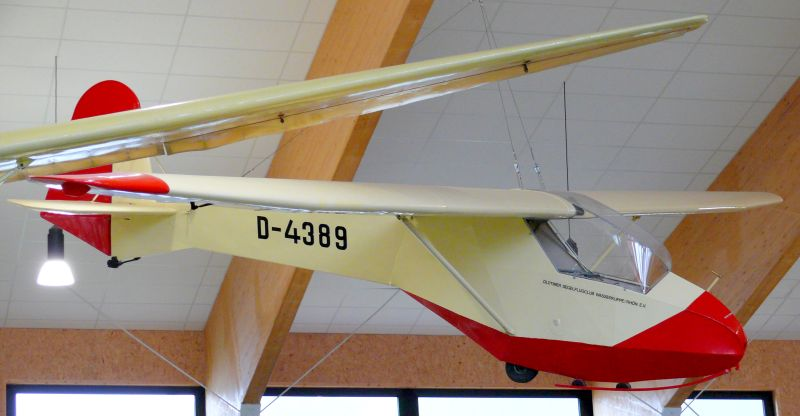 Raab Doppelraab V, D-4389, eigenes Bild